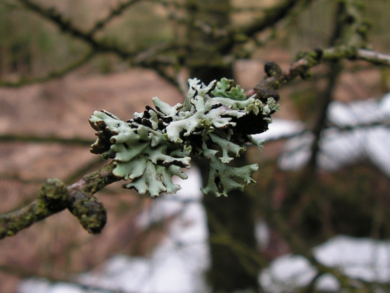 Hypogymnia physodes (Blasenflechte; Erzgebirge, Germany)